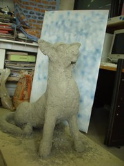 Statue en liant papier réalisée dans le cadre d'un travail d'étude sur les propriétés du liant papier au CSES jean Lagarde.